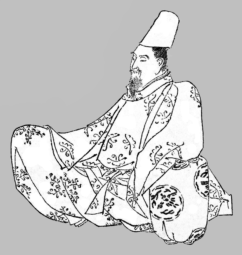 兼明親王 / Prince Kakeakira (914–987)